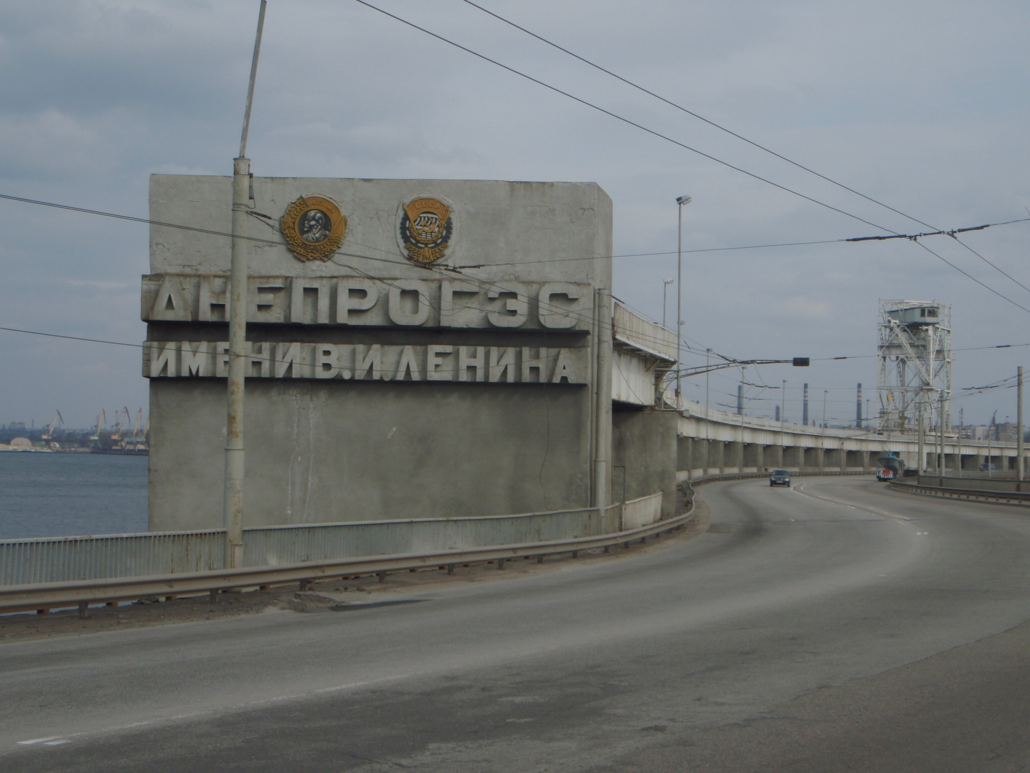 Дніпрогес